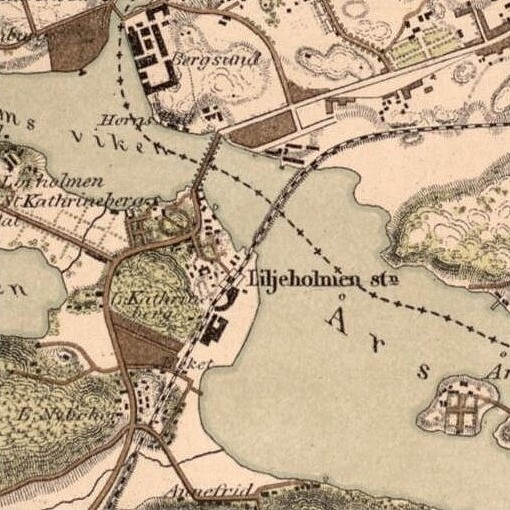 Liljeholmens station på Topografiska Corpsens serie Trakten omkring Stockholm i nio blad. Utgiven 1861 och översedd 1891.